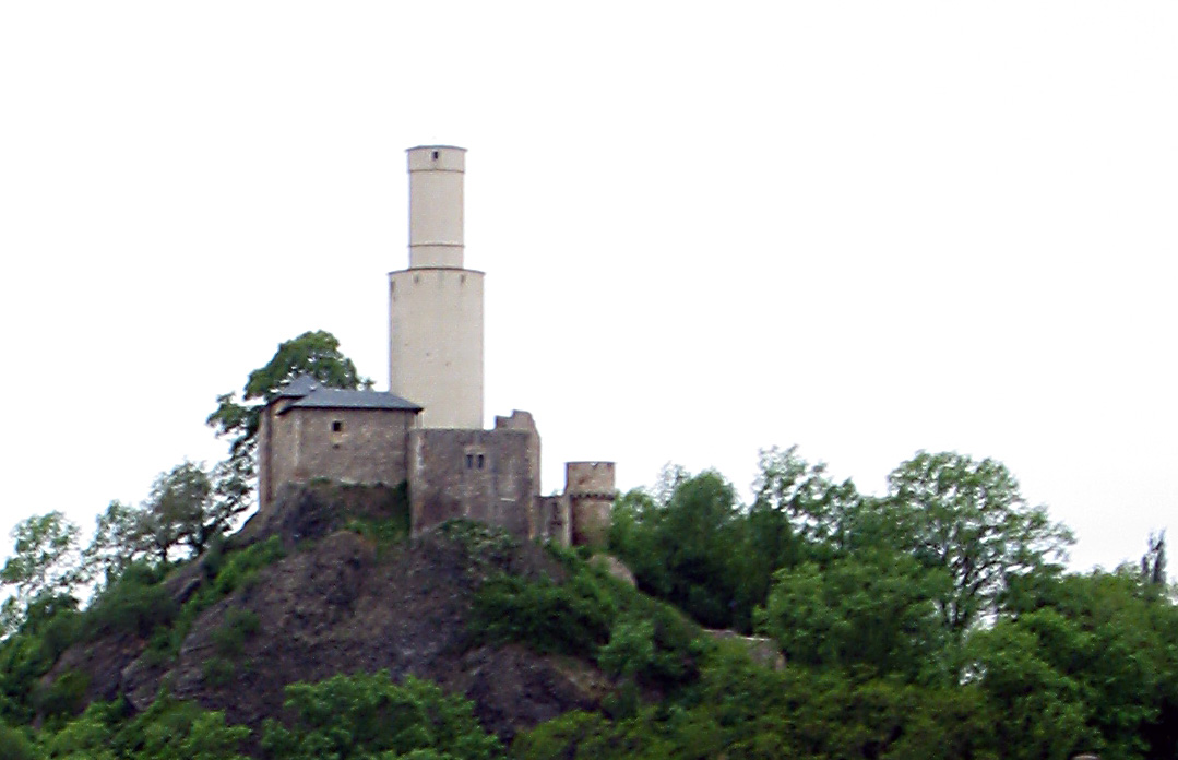 Felsburg in Felsberg (Hessen)